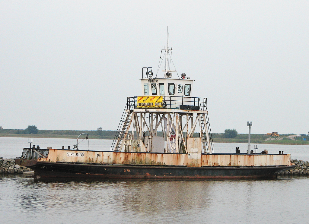 Beschreibung: außer Dienst gestellte Fähre Wittow im Barther Hafen / Baujahr 1895 Fotograf: Darkone, 7. September 2005